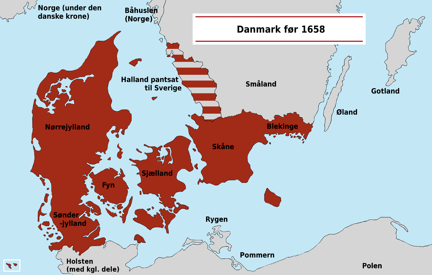 Danmark før 1658